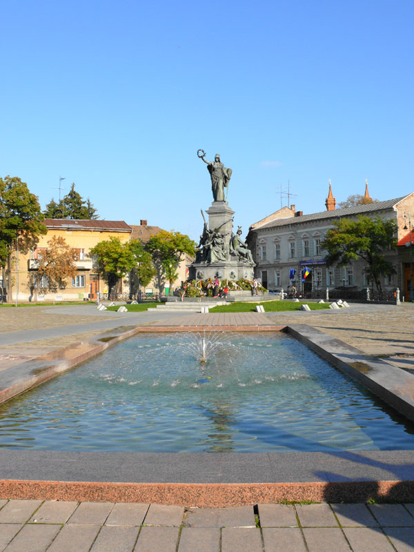 A Szabadság-szobor Aradon